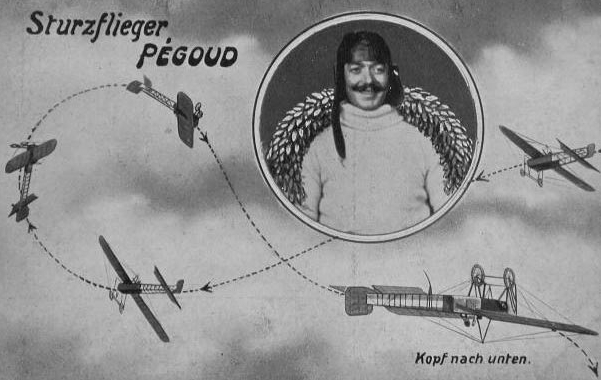 Postal alemana de antes de la guerra que representa el loop de Pegoud